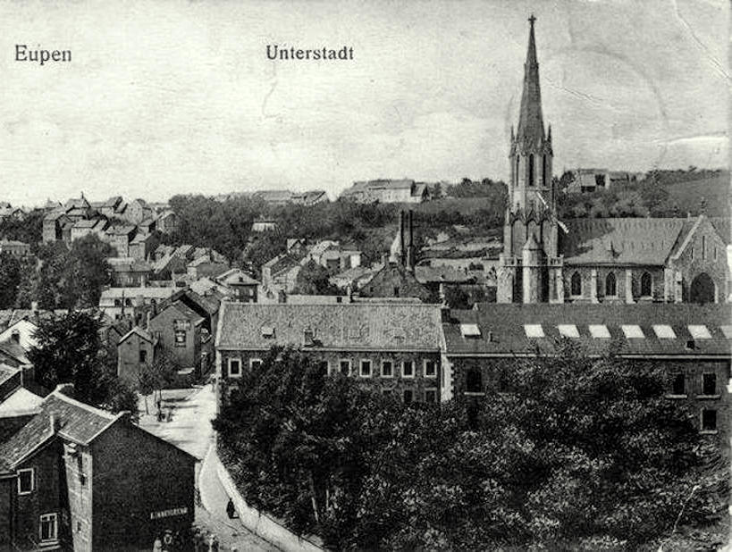 Teilansicht der ehemaligen Tuchfabrik Leonhard Peters in Eupen - Unterstadt vor der Kirche St. Josef (heute Parkplatzgelände)